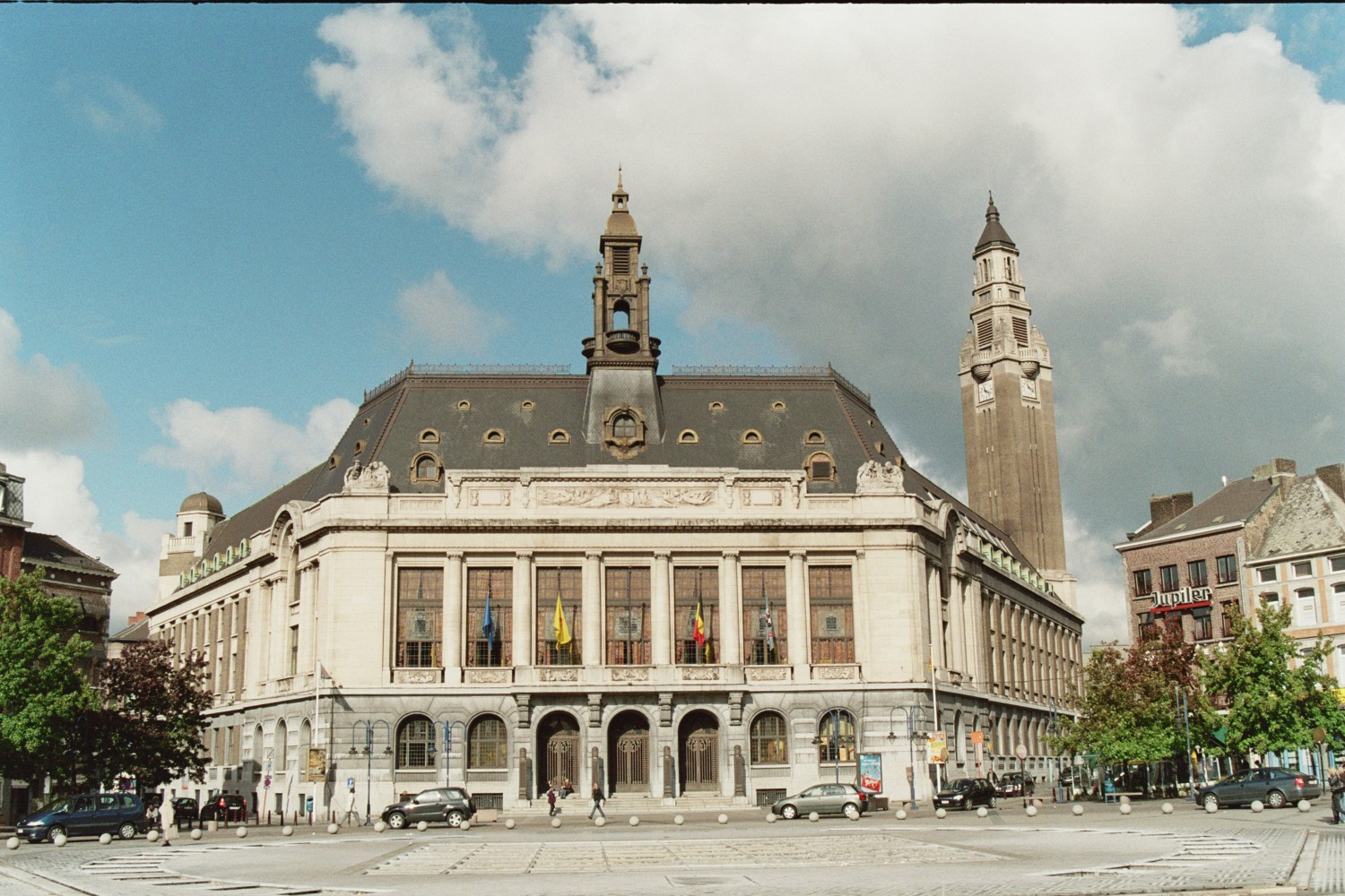 Hôtel de Ville de Charleroi, Belgique